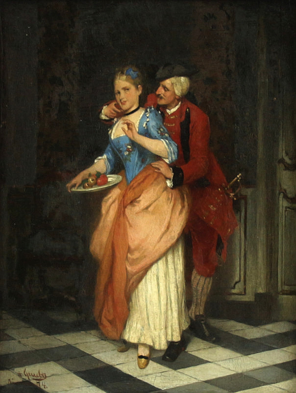 Tändelei